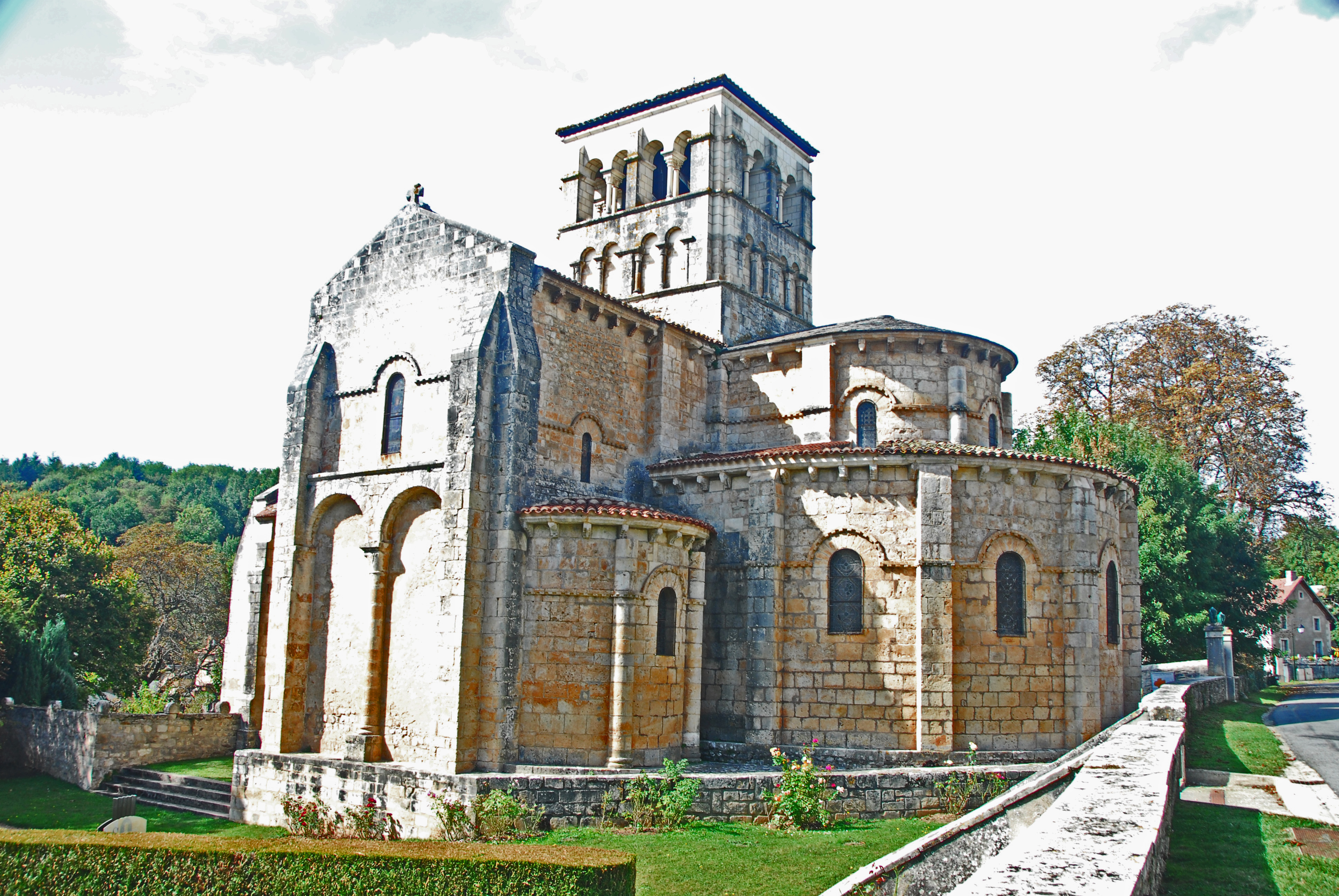 Ste-Croix de Veauce